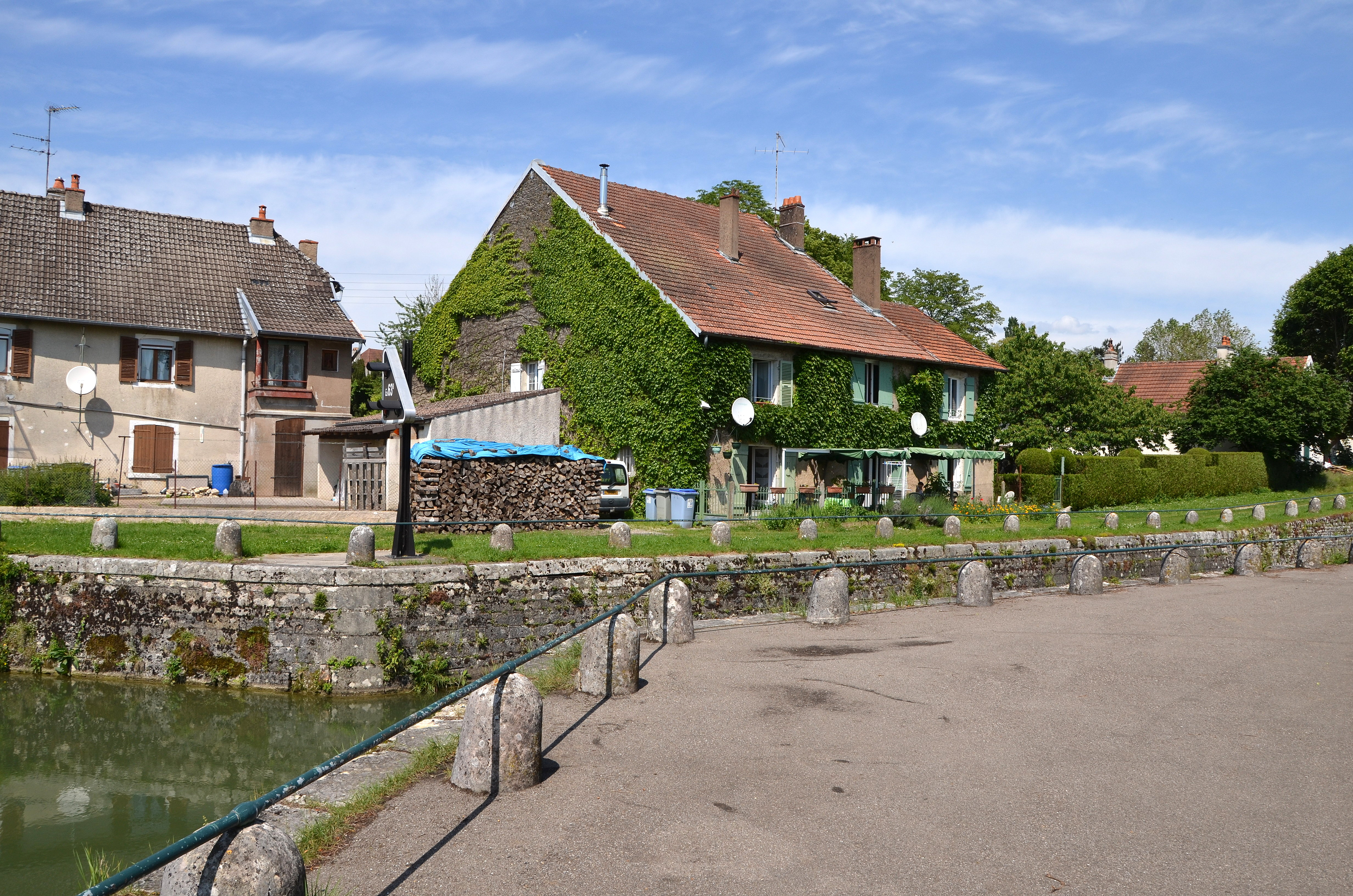 Le canal du Rhone au Rhin a Orchamps , Jura Franche-Comté, France